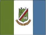 Bandeira do município de Cana Verde, Minas Gerais, Brasil.